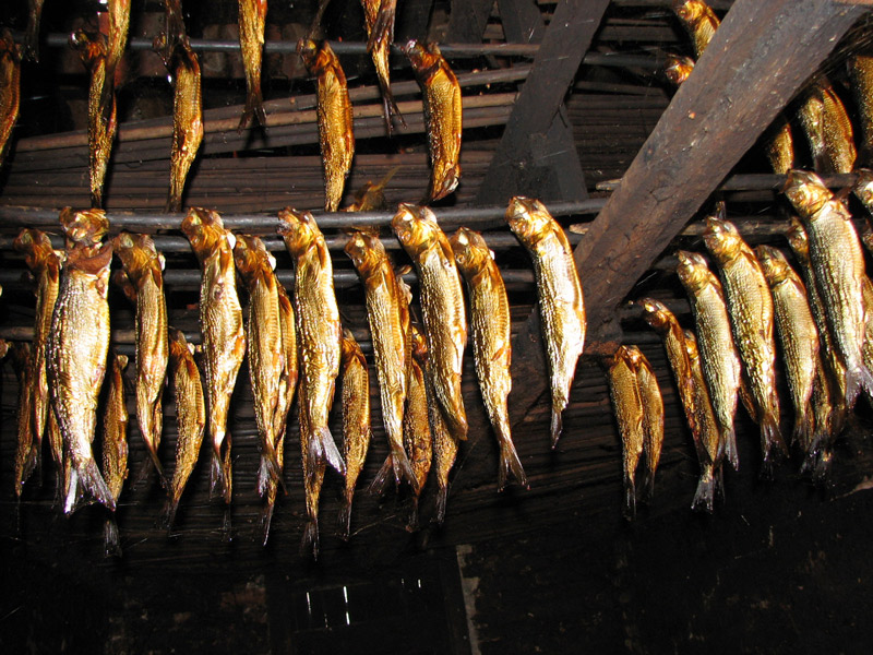 rookoven, oven to smoke food